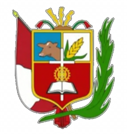 Escudo de Llapa